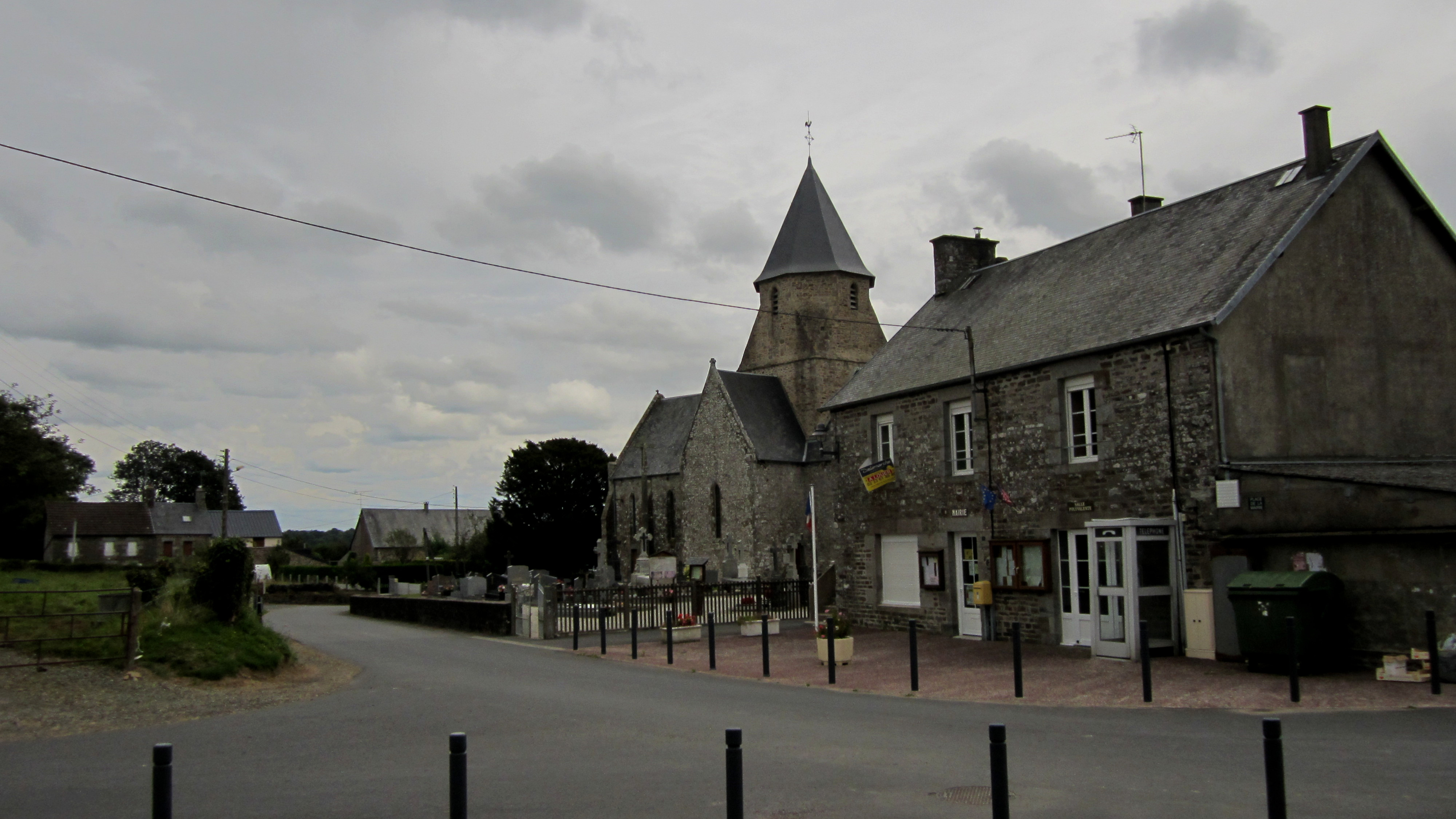 La Meurdraquière, Manche